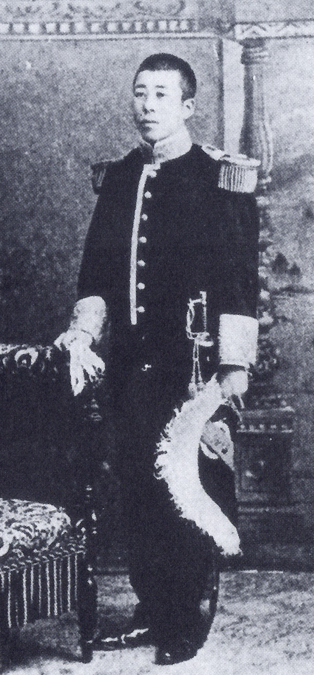 間部詮道の肖像。